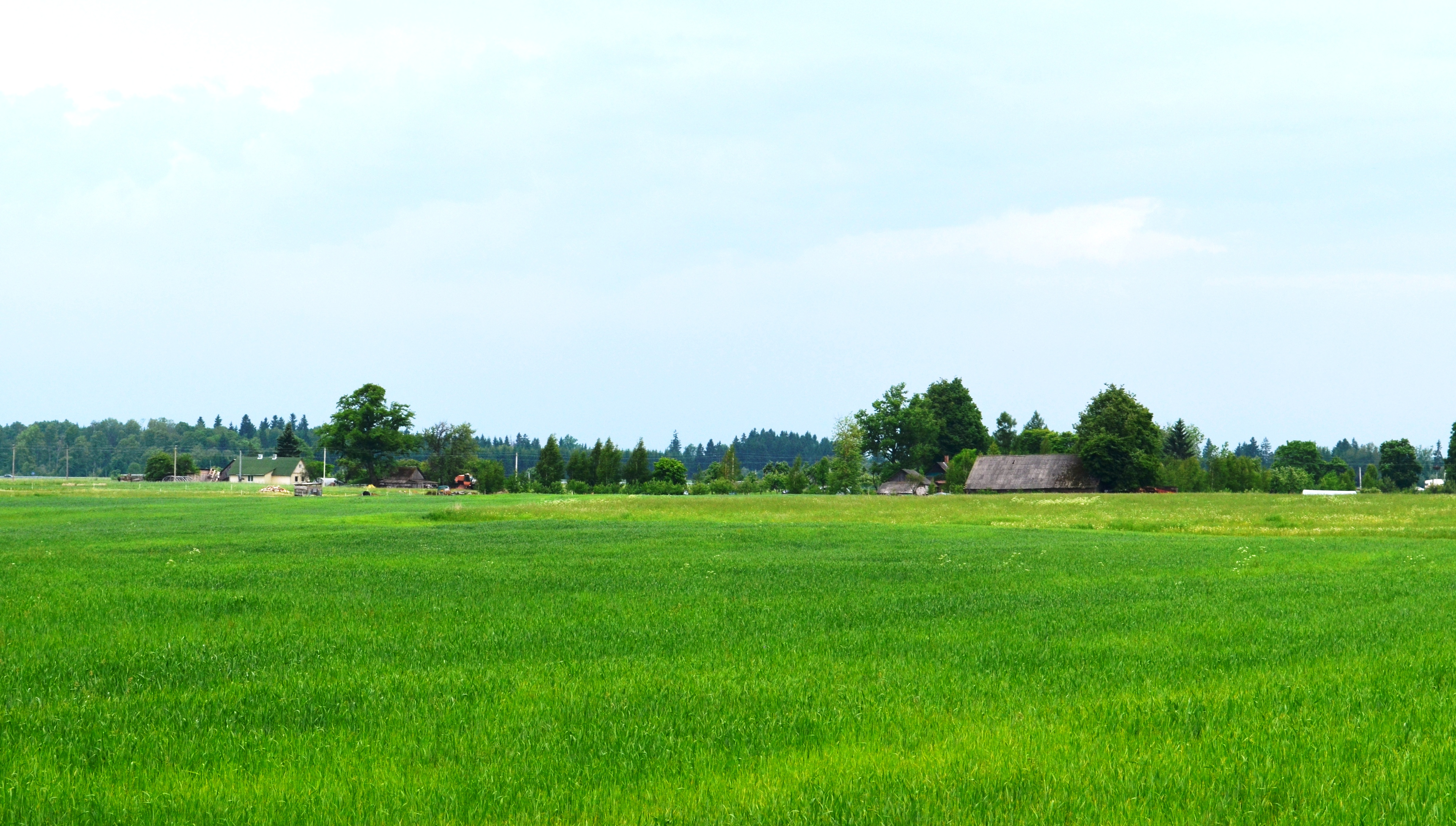 Rimučiai, Širvintų raj.